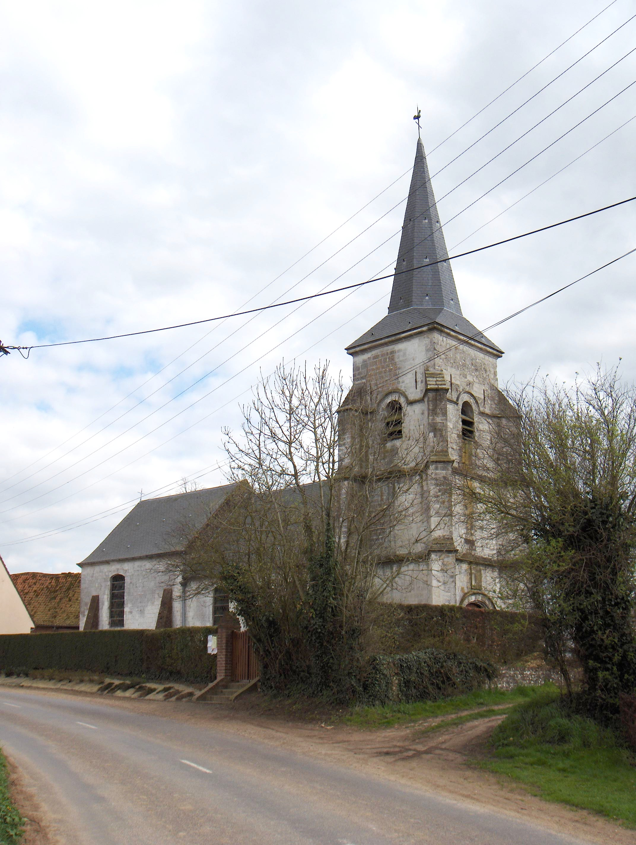 Delettes, Ortsteil Upen d'Aval (Frankreich, Dept. Pas-de-Calais), Dorfkirche an der Rue des Deux Upen.